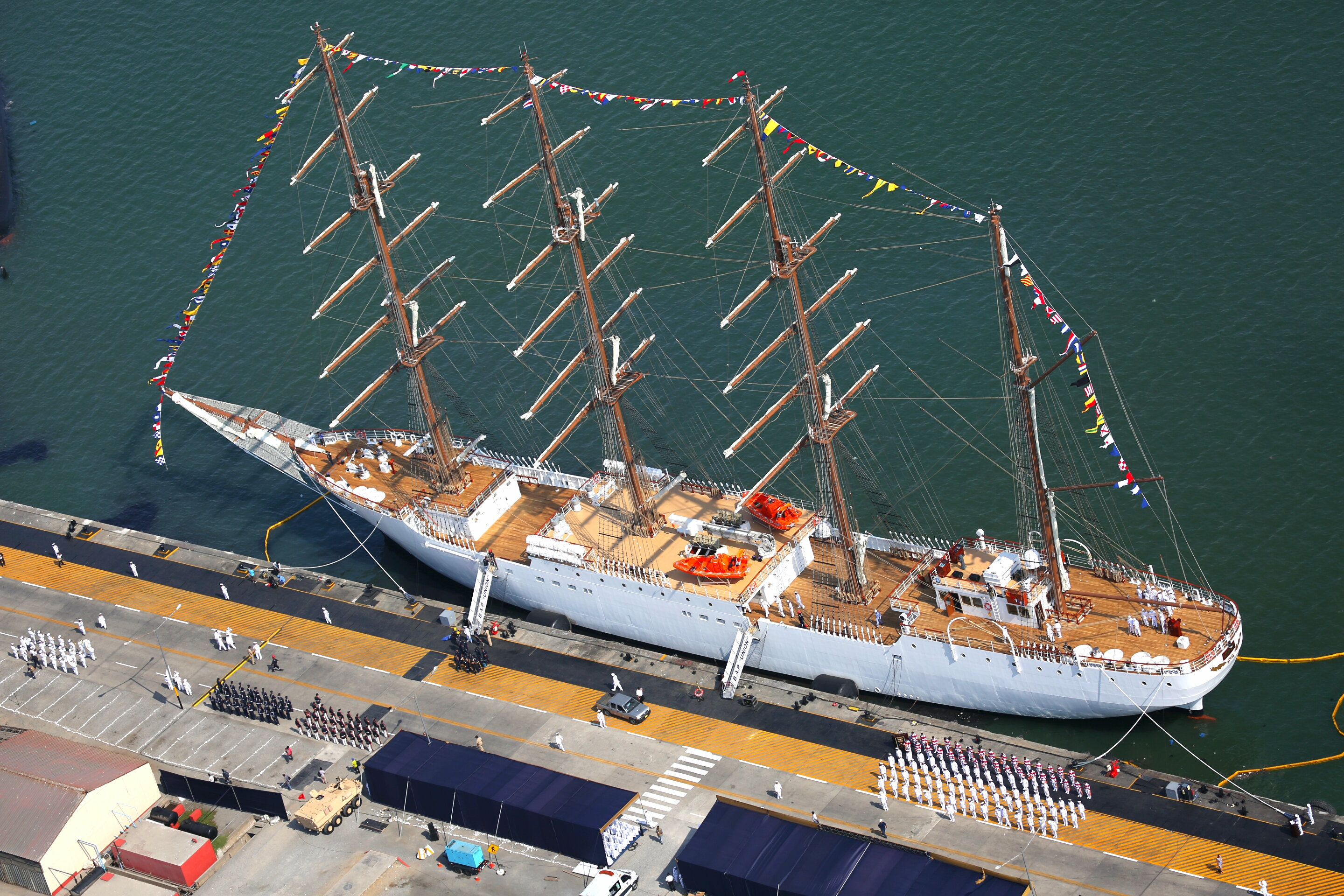 En ceremonia encabezada por el Presidente Ollanta Humala, se realizó el Afirmado del Pabellón Nacional en el Buque Escuela a Vela “Unión”, el más grande de Latinoamérica y que constituye un hito en la industria naval del Perú. En la ceremonia estuvieron presentes el Presidente del Consejo de Ministros, Pedro Cateriano Bellido; el Ministro de Defensa, Jakke Valakivi Álvarez y el Comandante General de la Marina, Almirante Edmundo Deville del Campo e invitados, entre ellos, el Ministro de Defensa de España, Pedro Morenés, el secretario de Defensa de Estados Unidos de México, Francisco Soberón, y el general de División Salvador Cienfuegos, entre otros invitados.